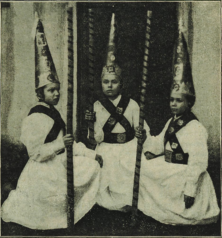 «Пастухи» («Три короля»)